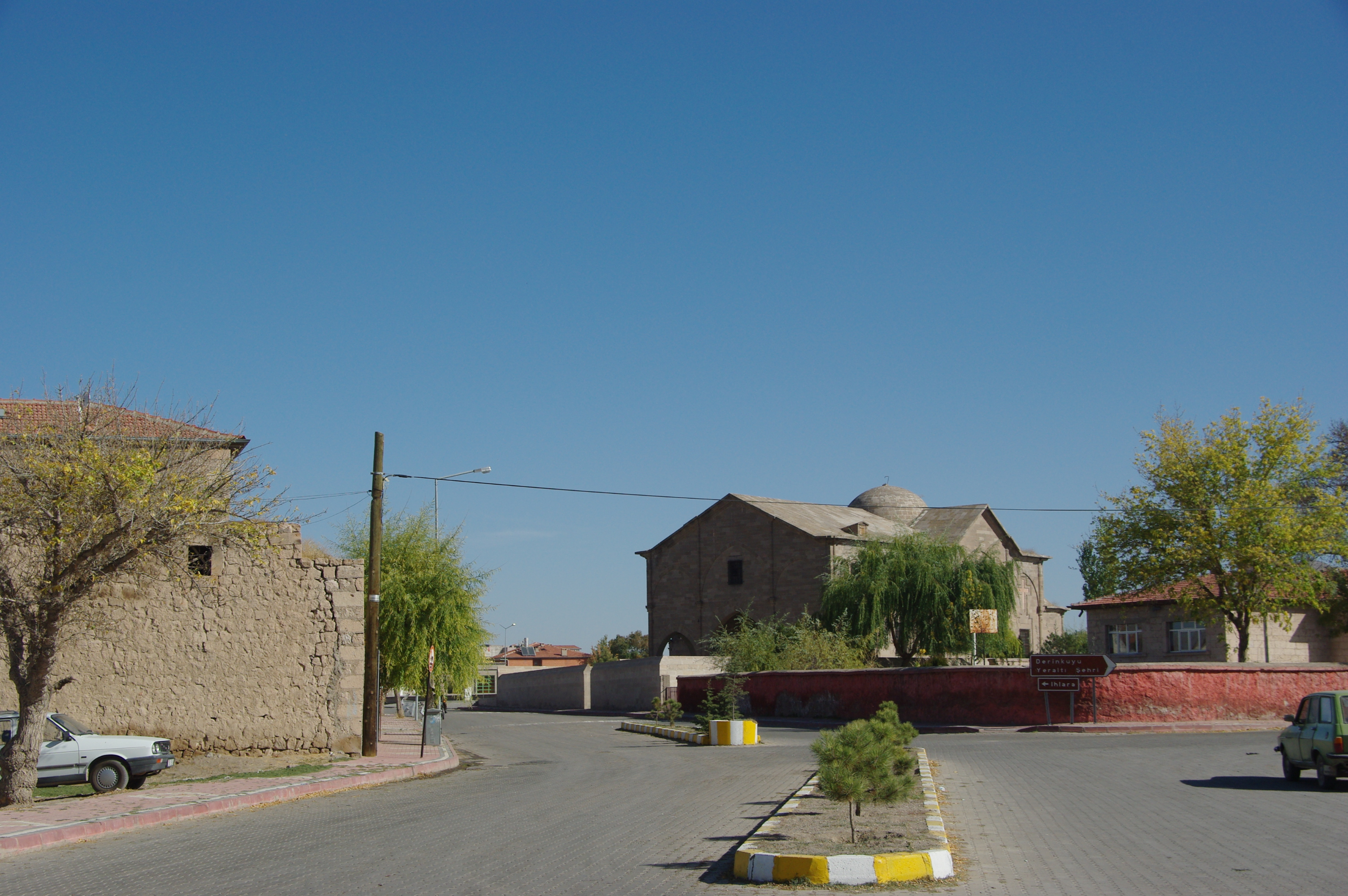 Derinkuyu, Turkey 2009-10-16